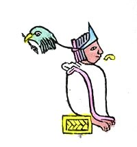 Huitzilíhuitl en Codice.